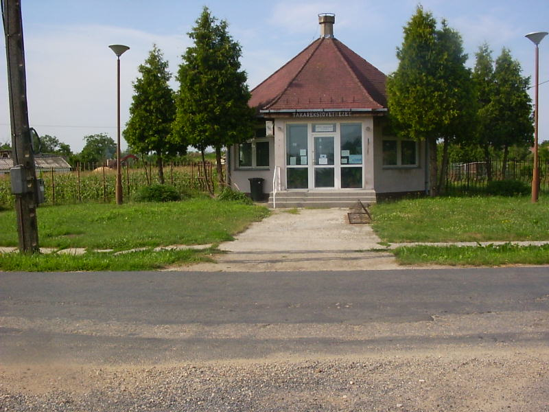 A helyi takarékszövetkezet irodája Egyeden